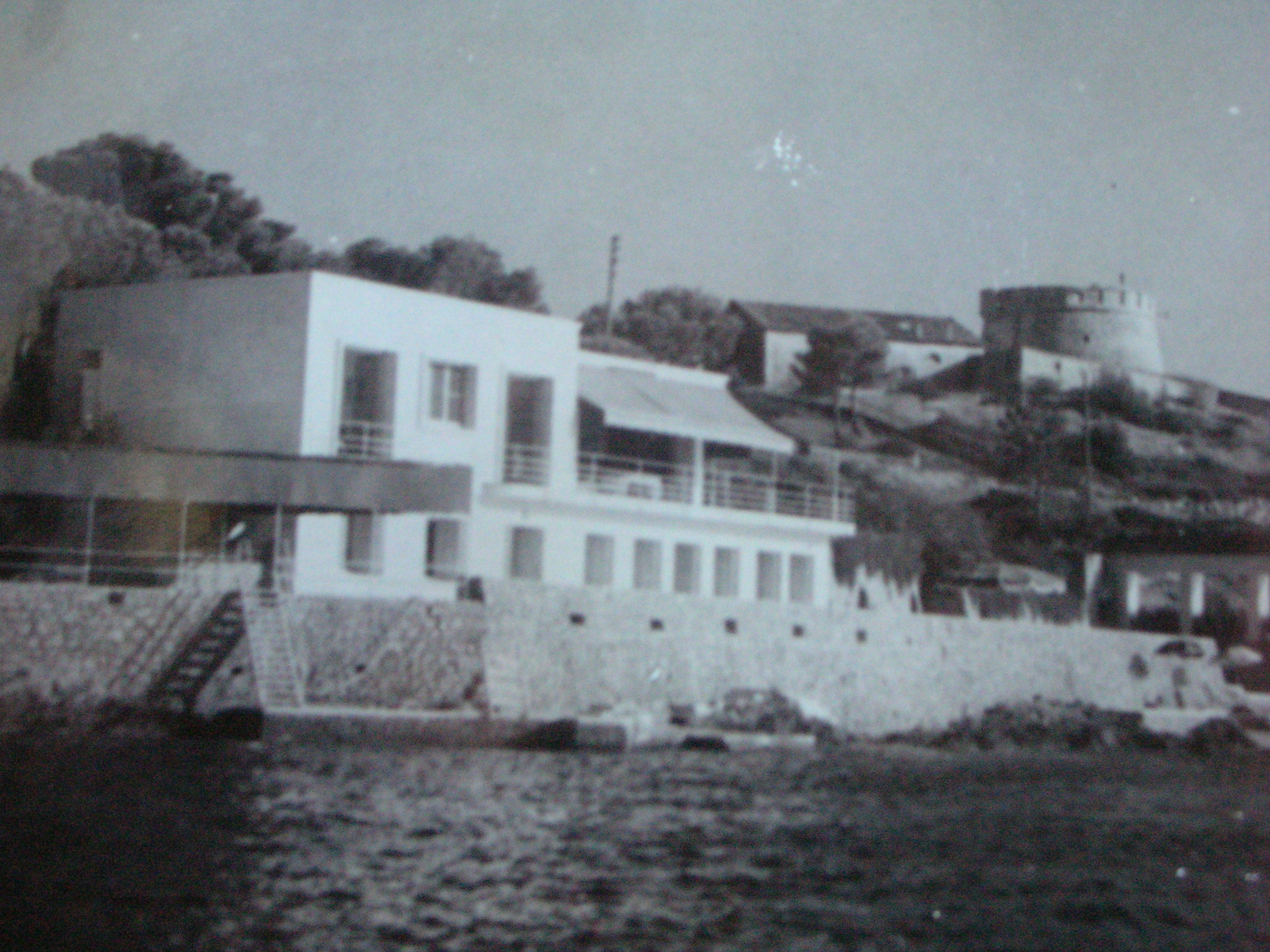 Collection Elena Allard